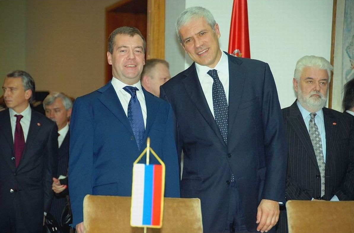 Председници Србије и Русије, Борис Тадић и Дмитриј Медведев у палати "Србија". 20.октобар 2009.године у Београду Аутор Фотографије: Драган Жебељан